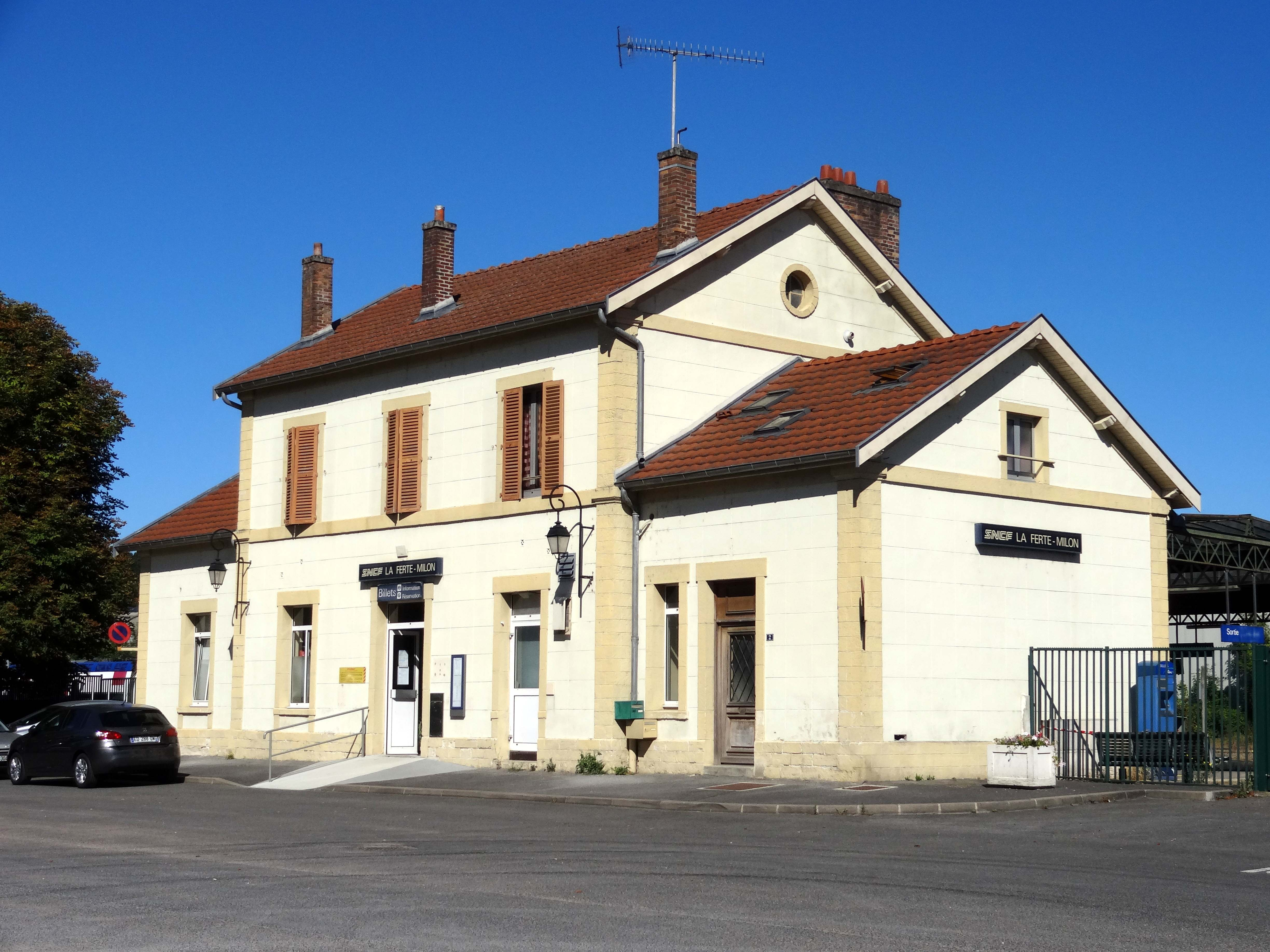 Gare SNCF, côté cour.